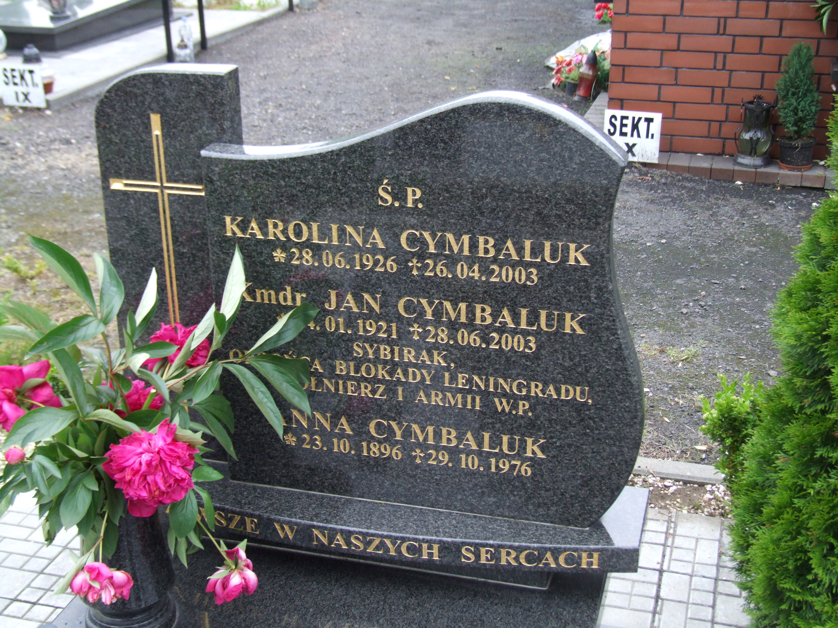 Gdynia-Oksywie Cmentarz Marynarki Wojennej